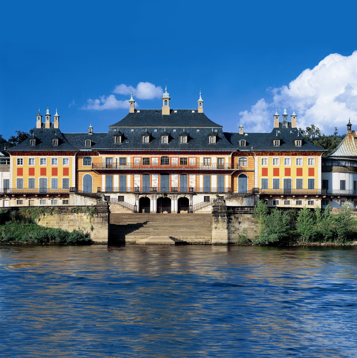 Schloss Pillnitz, Wasserpalais, Photo Werner Lieberknecht, (c) SKD